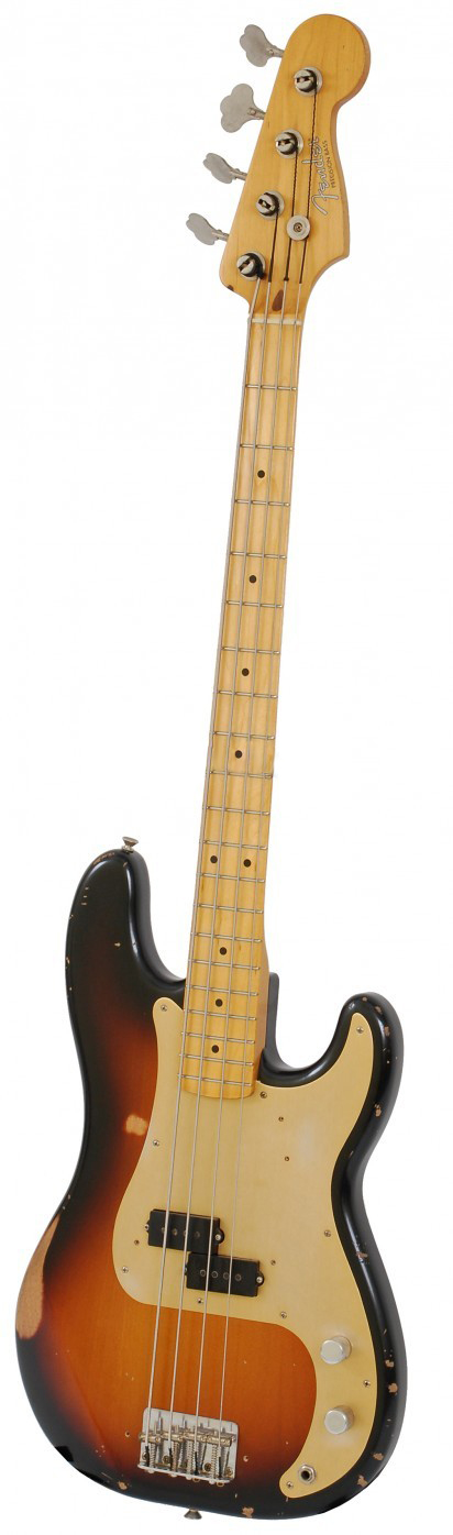 Gitara basowa Road Worn 50's P-Bass firmy Fender